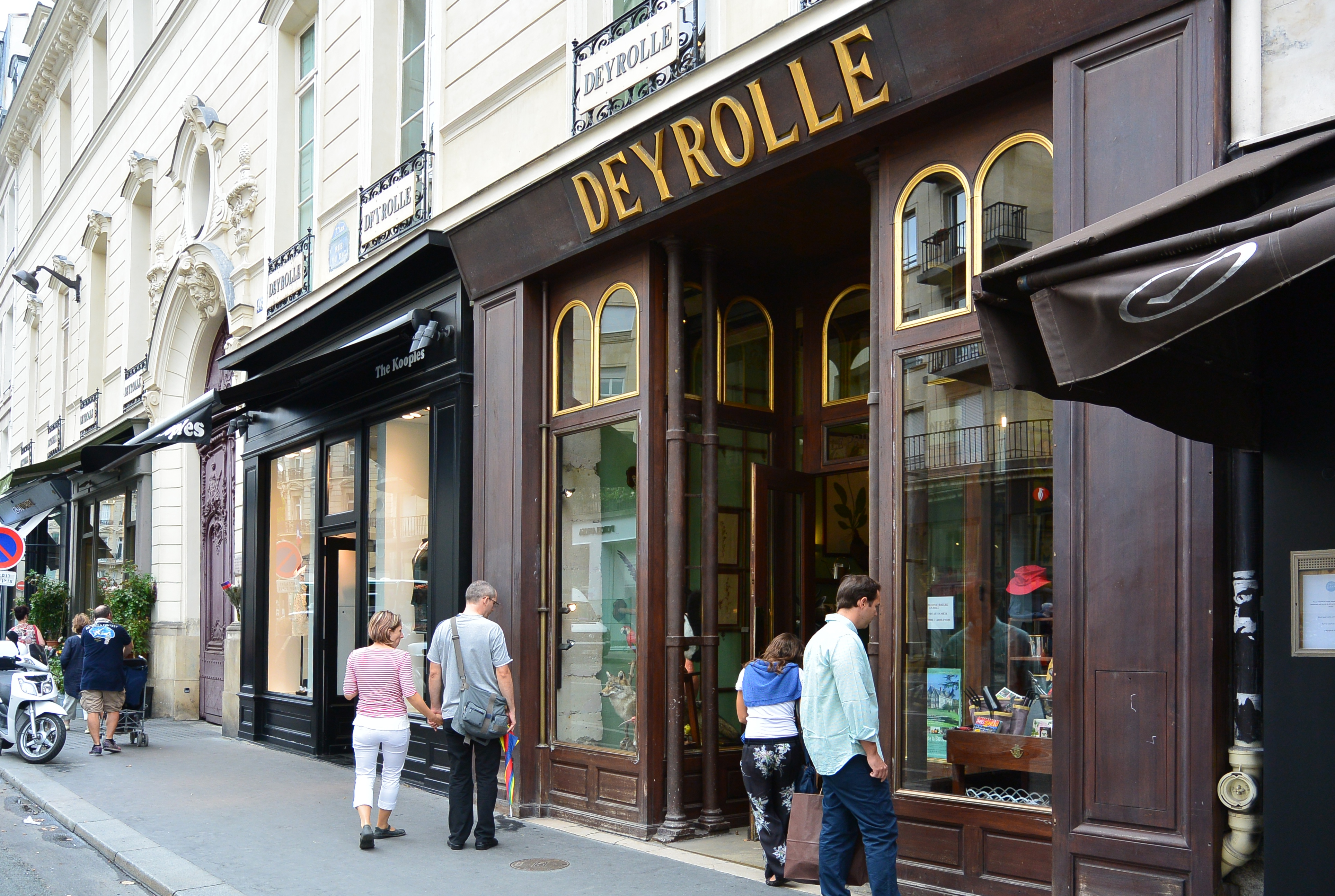 Taxidermy shop Deyrolle, 46 Rue du Bac, 75007 Paris, France.